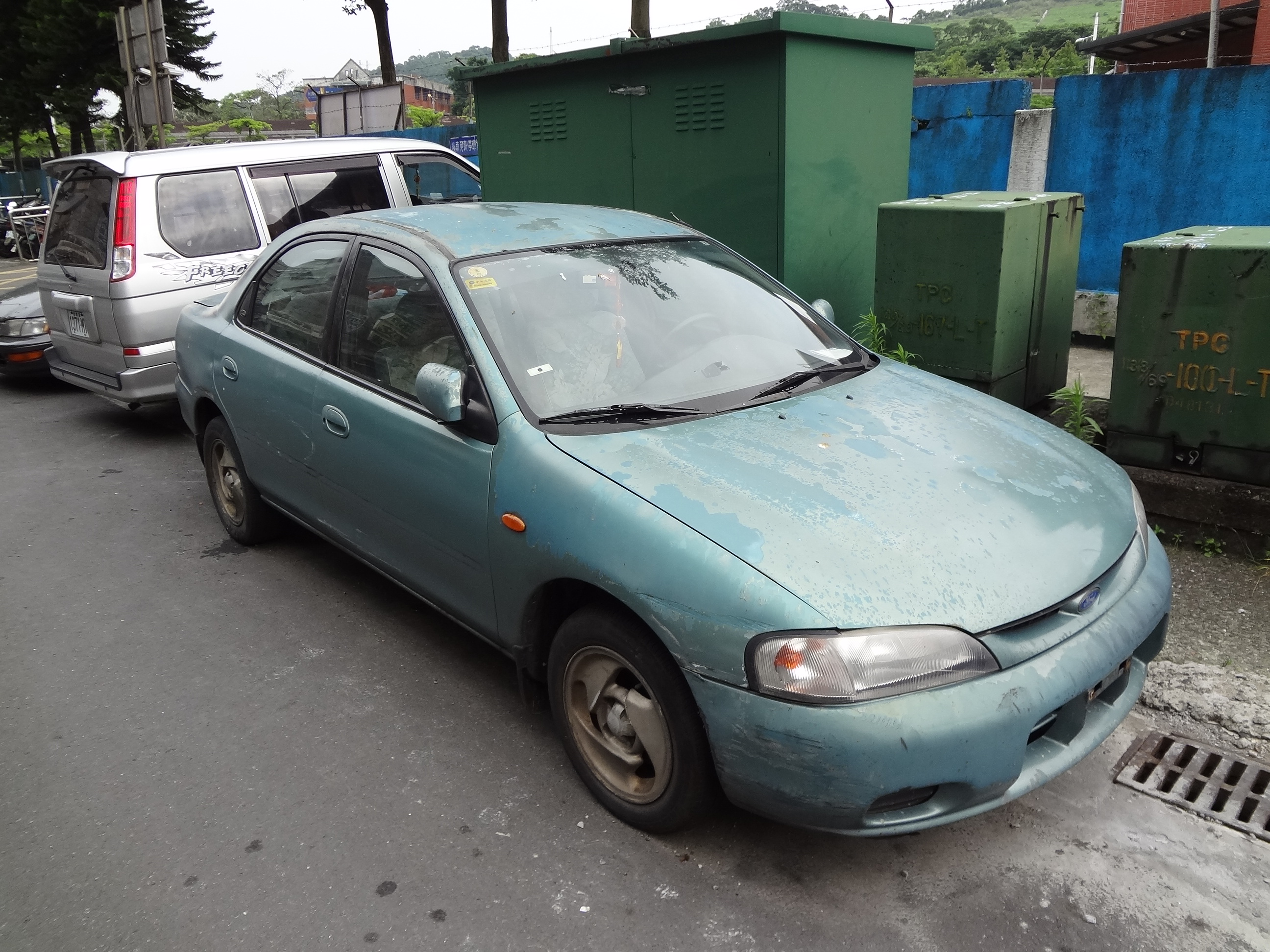 1996年福特你愛她（Ford Liata）右前方外觀